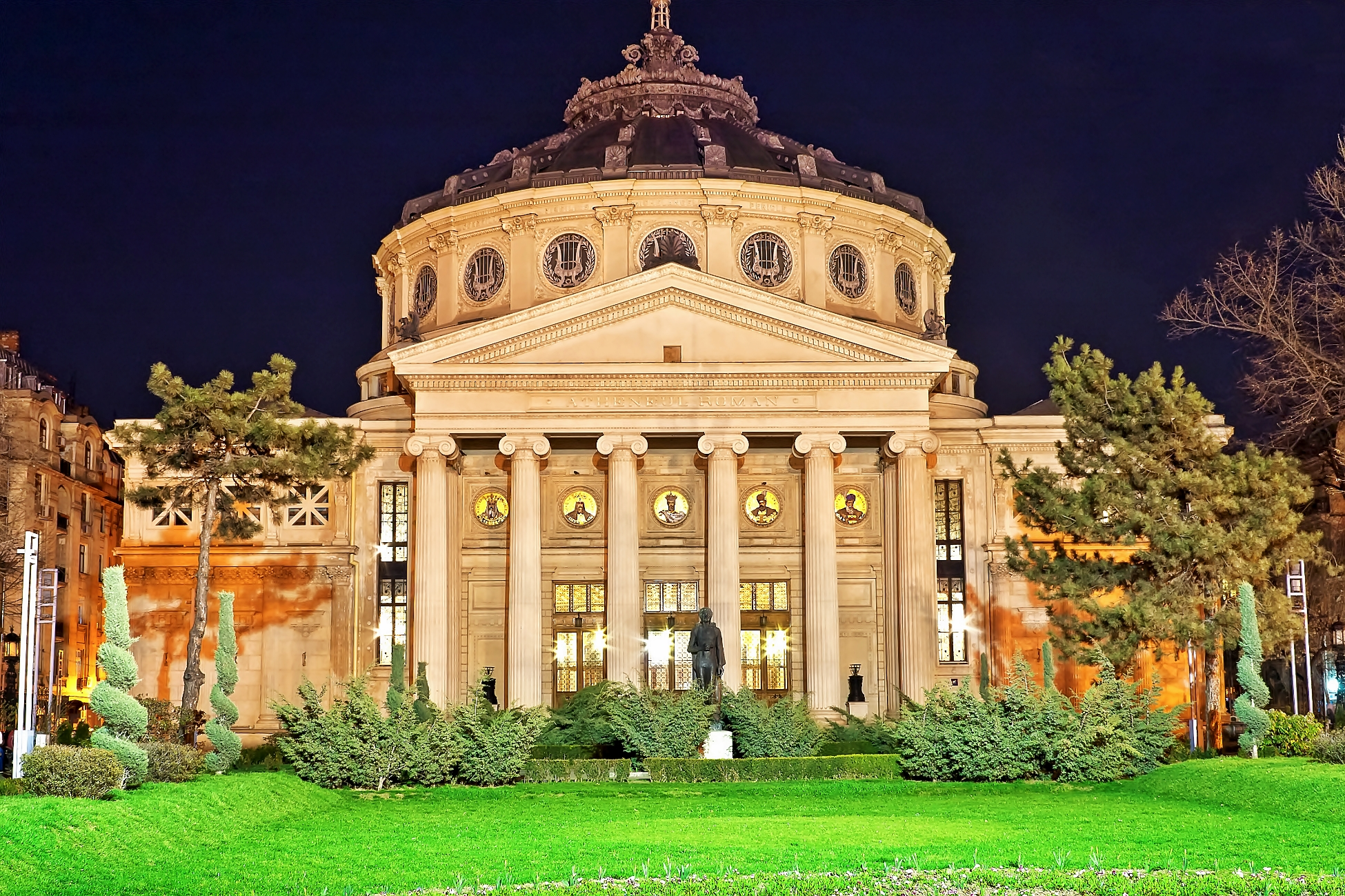 Ateneul Roman situat pe Str. Franklin Benjamin 1-3 sector 1 Bucuresti; Construit in perioada 1886-1888